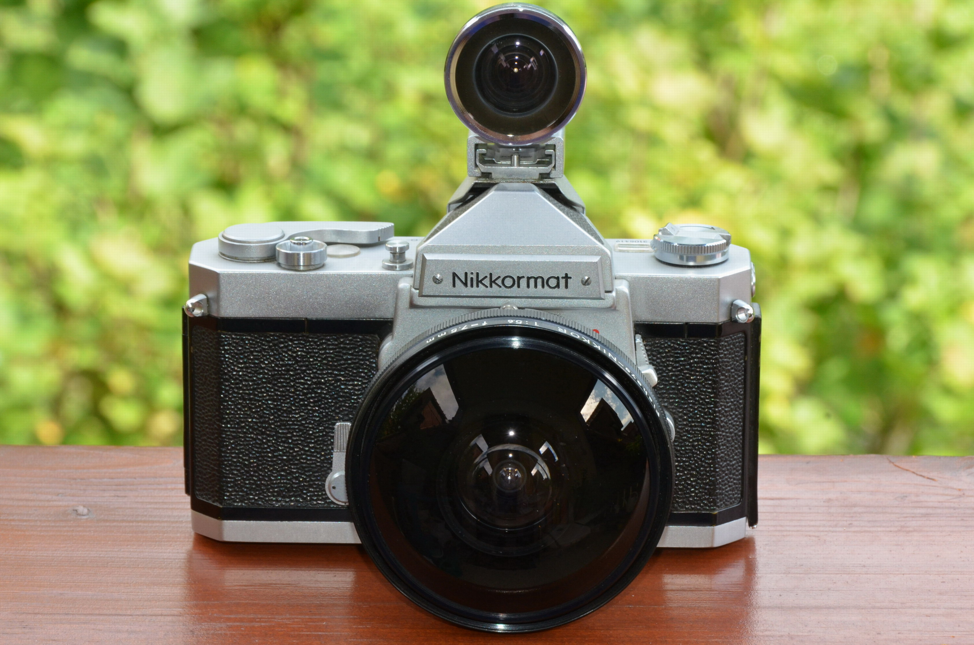 Nikkormat FT SLR camera with Fisheye-NIKKOR 1:5,6 f=7,5mm and finder; own work